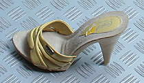 Damenmodell (Vintageschuh)